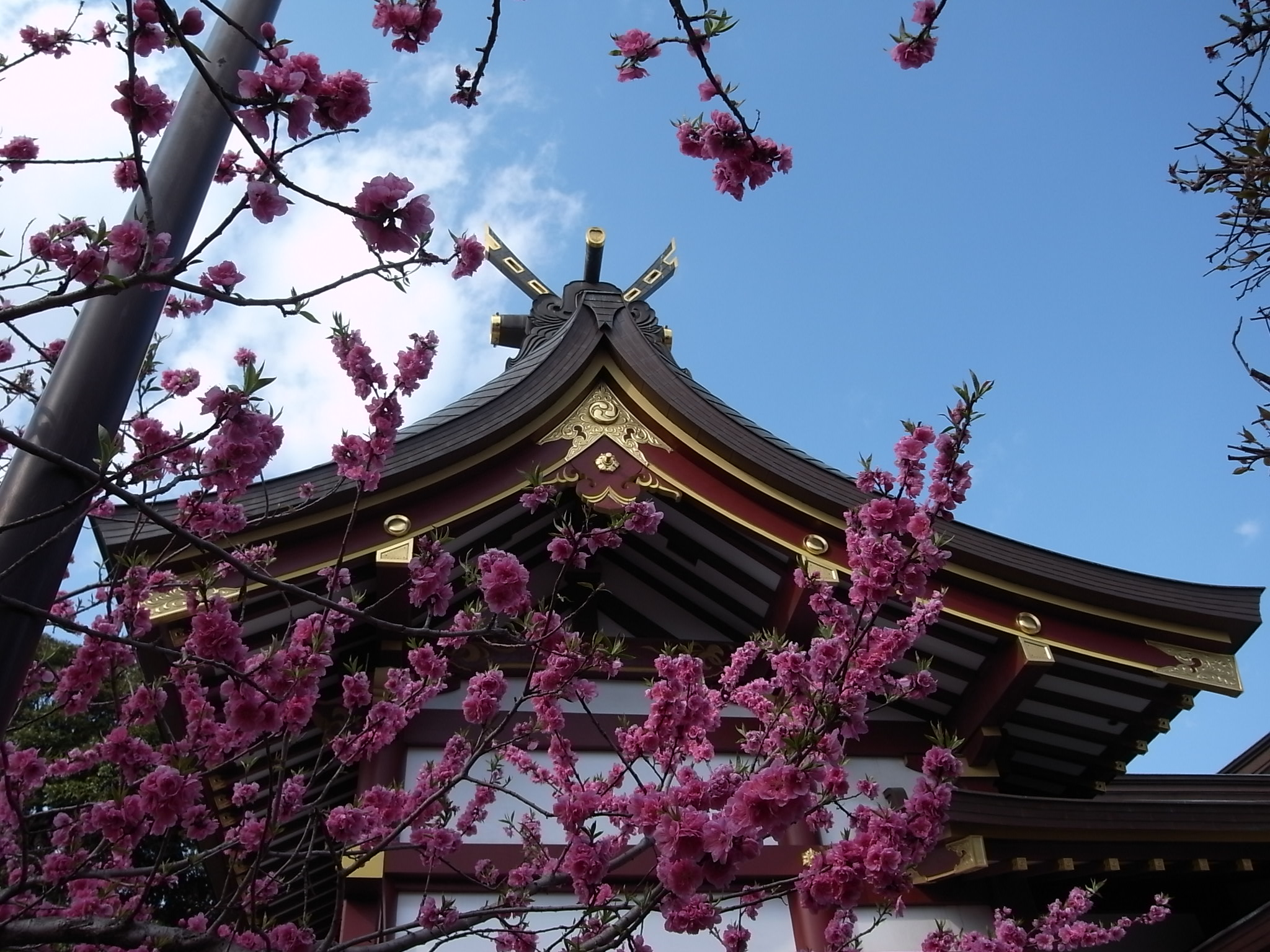 honden